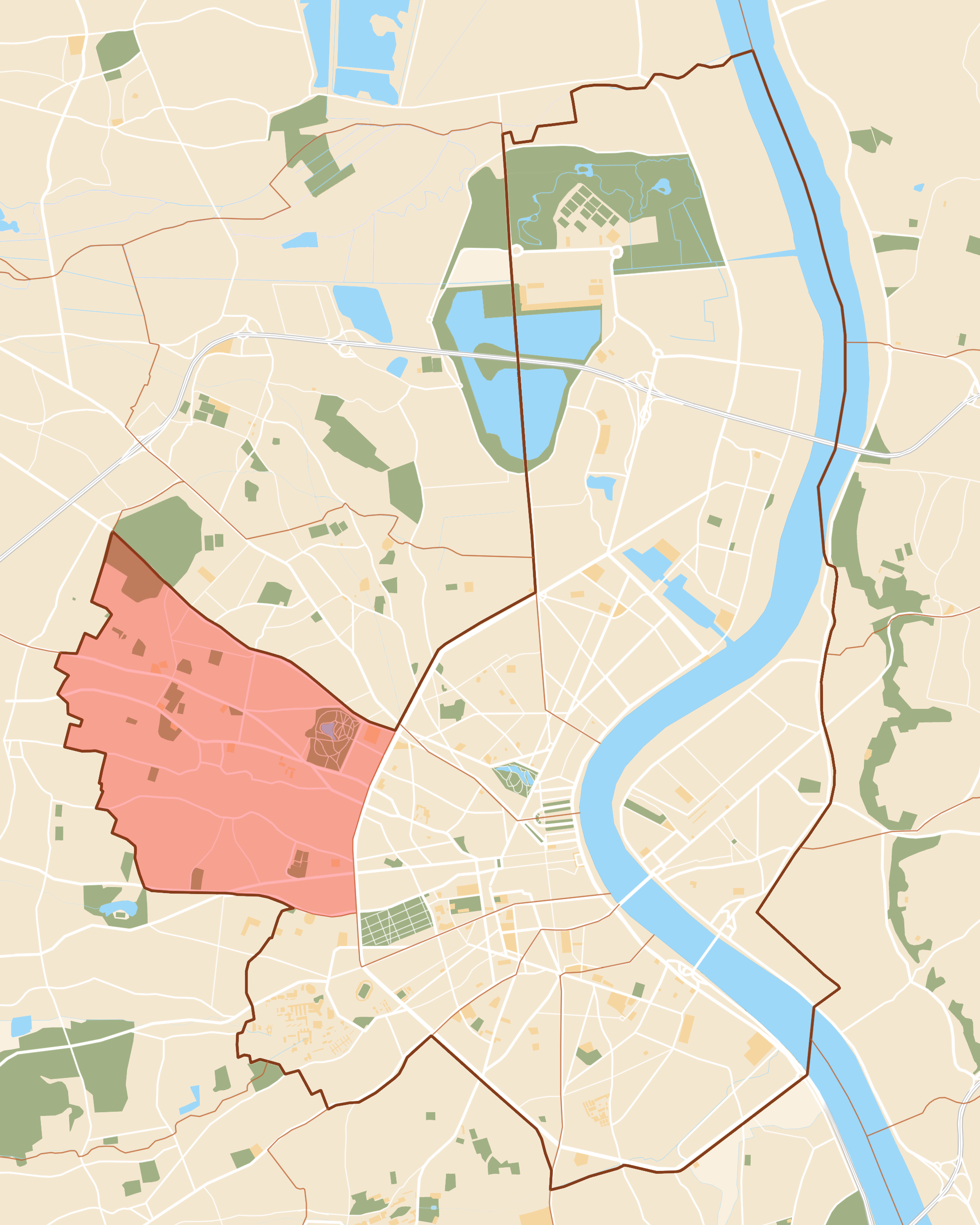 Plan de Bordeaux avec le Canton 8.